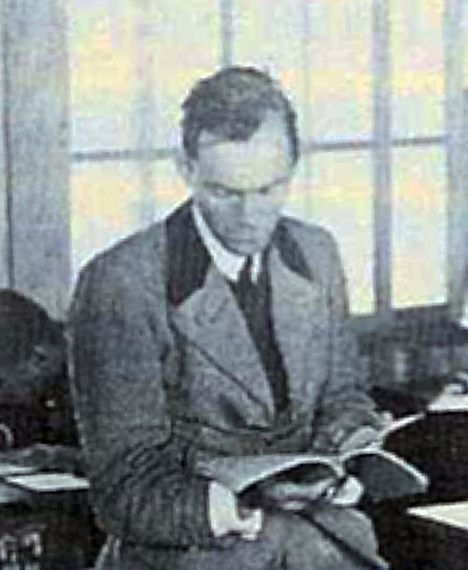 沃爾夫岡·克洛爾